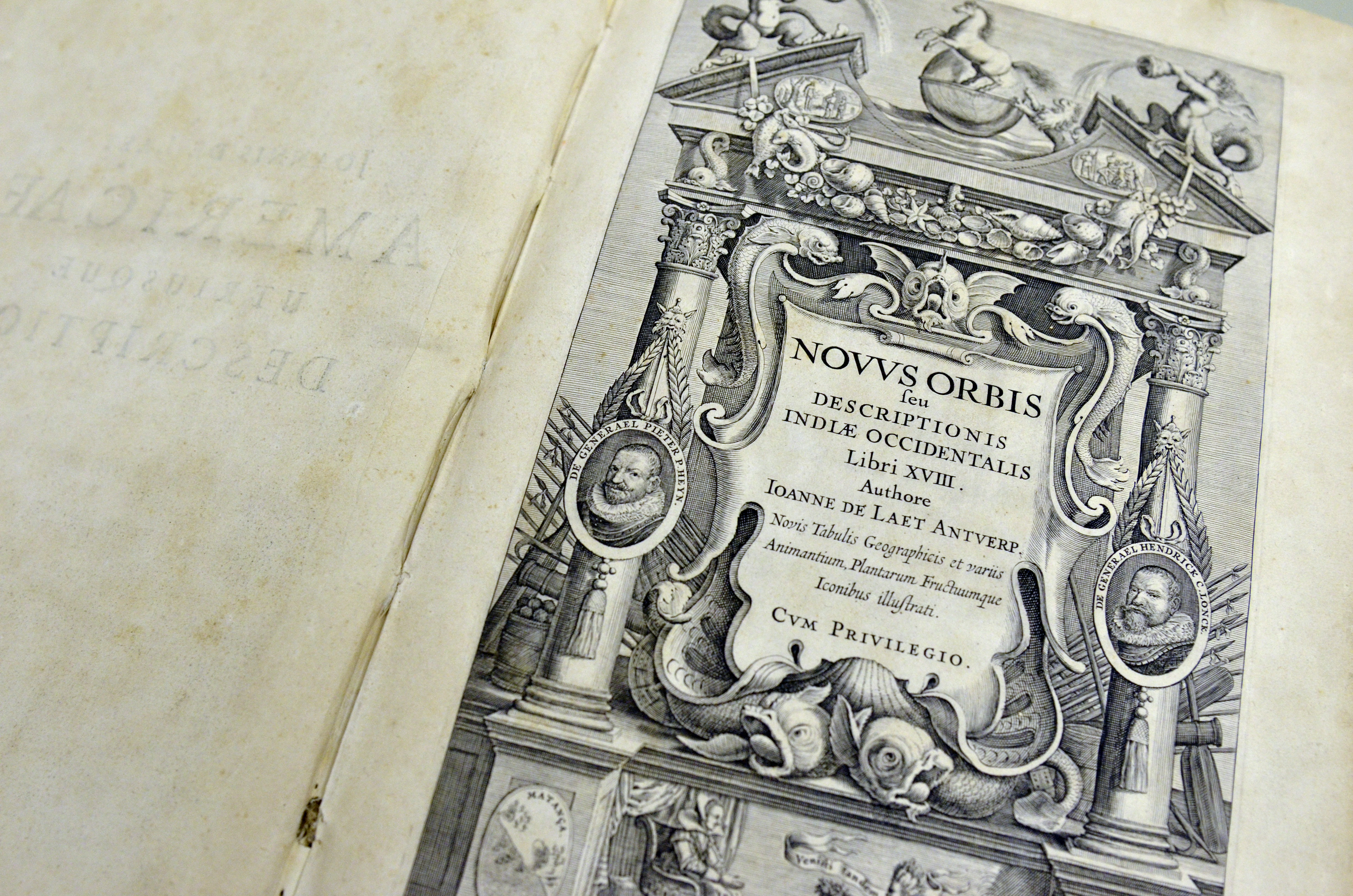 Acervo de obras raras da Biblioteca Acadêmico Luiz Viana Filho no Senado Federal. Foto: Ana Volpe/Agência Senado